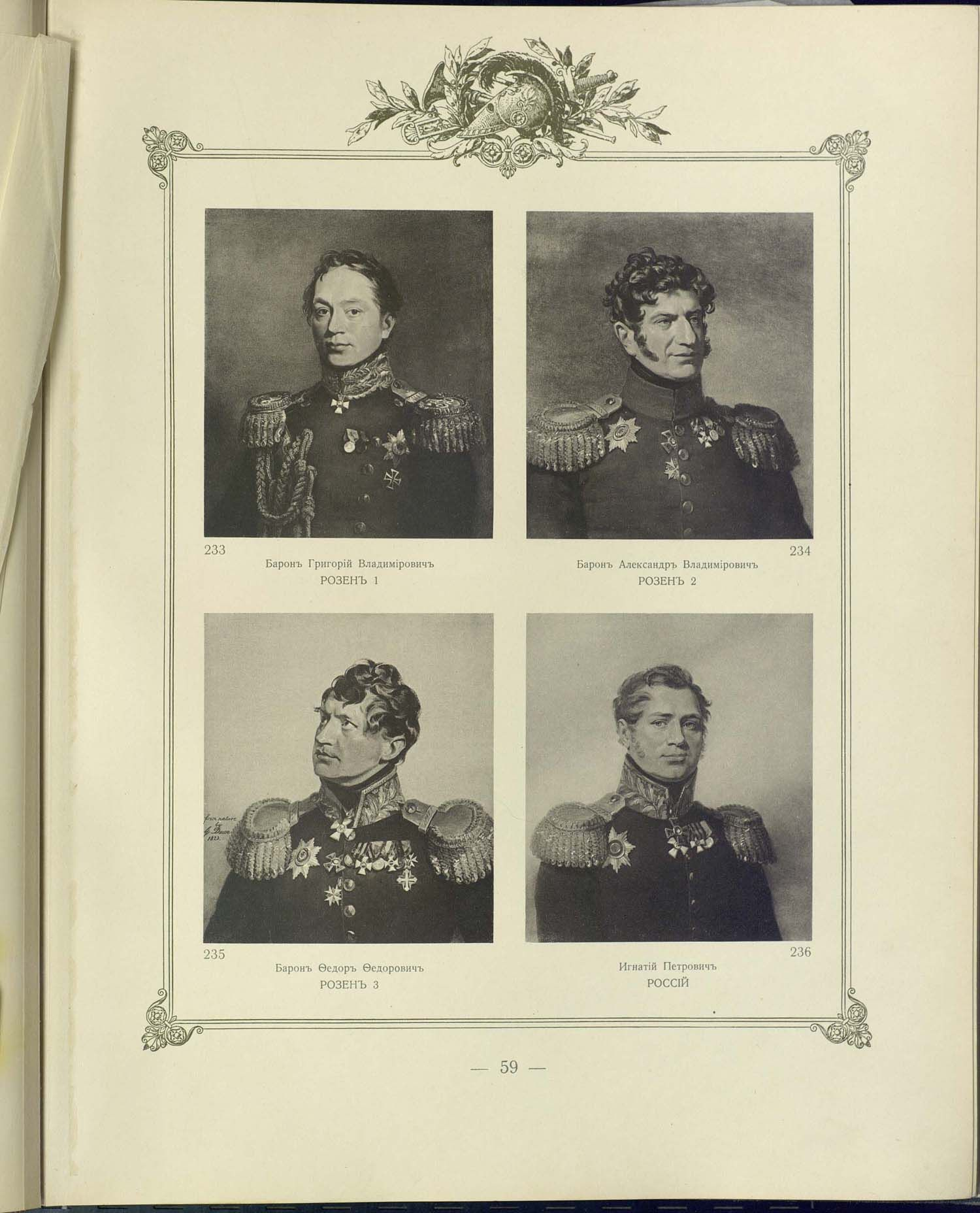 Портреты генералов Г. В. Розена, А. В. Розена, Ф. Ф. Розена и И. П. Россия